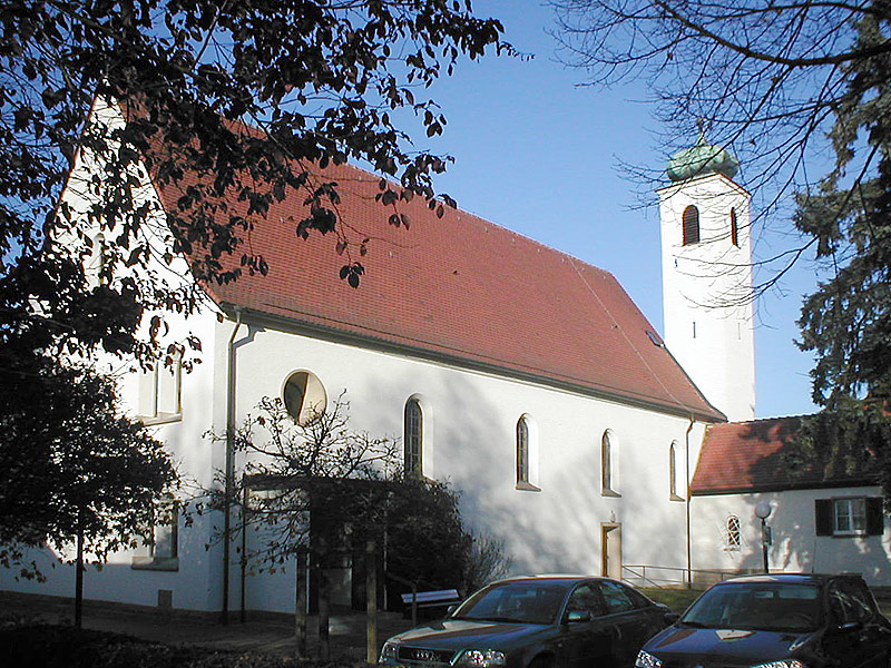 Kath. Kirche zum Heiligsten Herzen Jesu, Bad Rappenau, Baden-Württemberg, Deutschland